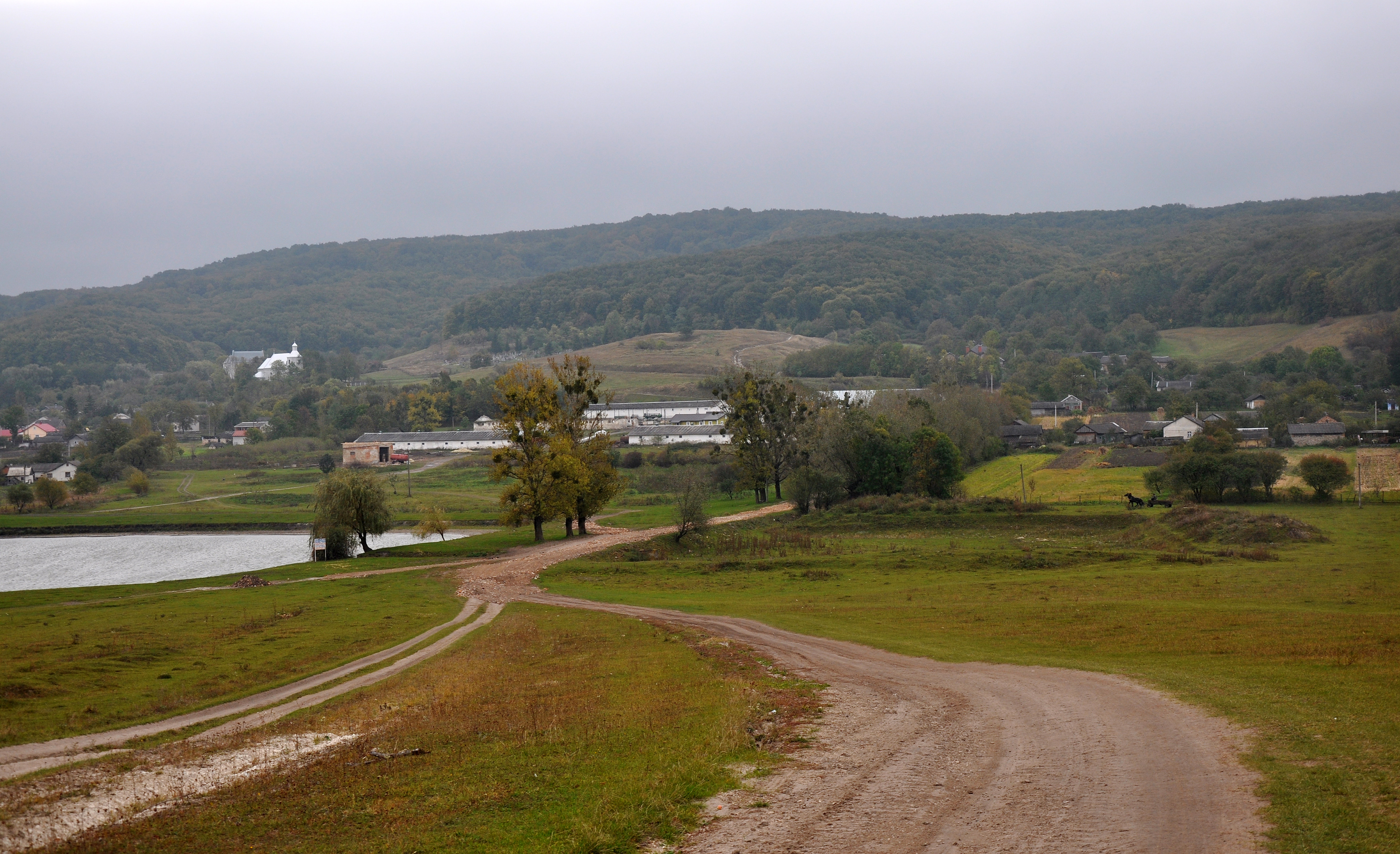 Гора Вапнярка, Золочівський район, Словітське л-во, кв.1, 2 (в.1-13); кв.3 (в.1-3; 5-7; 9-15); кв.7 (в.1-3)